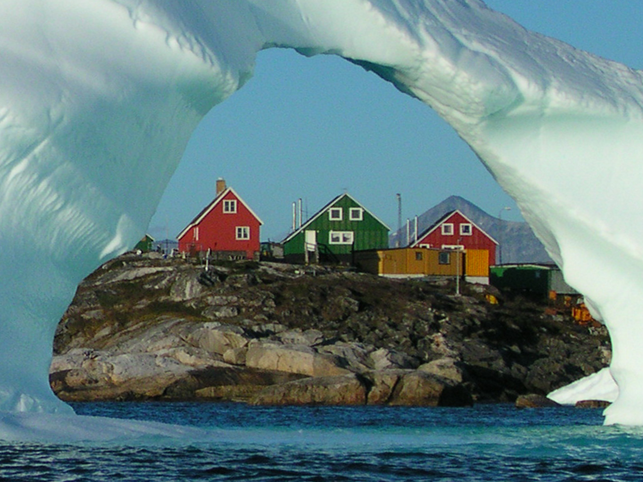 Typische grönländische Häuser in Alluitsup Paa in Grönland, Blick durch einen Eisberg.